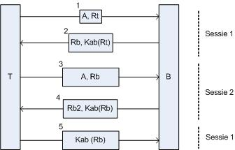 Authenticatie gebaseerd op een geheime gedeelde sleutel